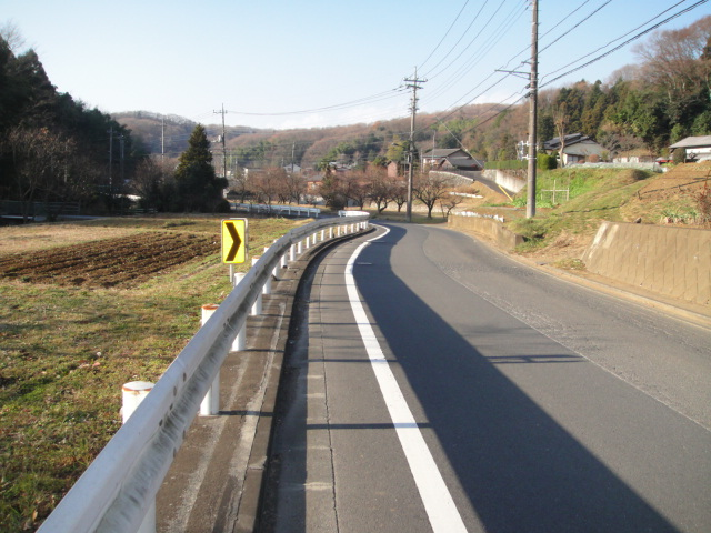 Tunnel-mania